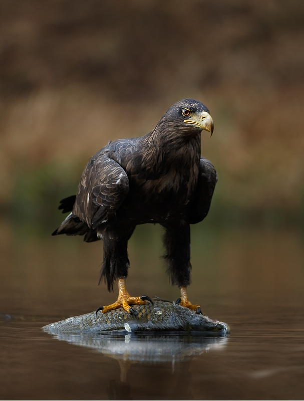 Haliaeetus albicilla, Žďárské vrchy, CZ